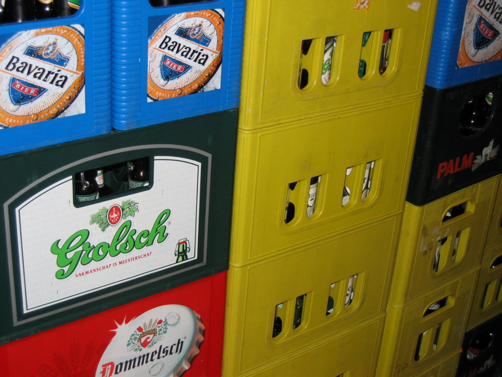 Image:Bierkratjes.JPG